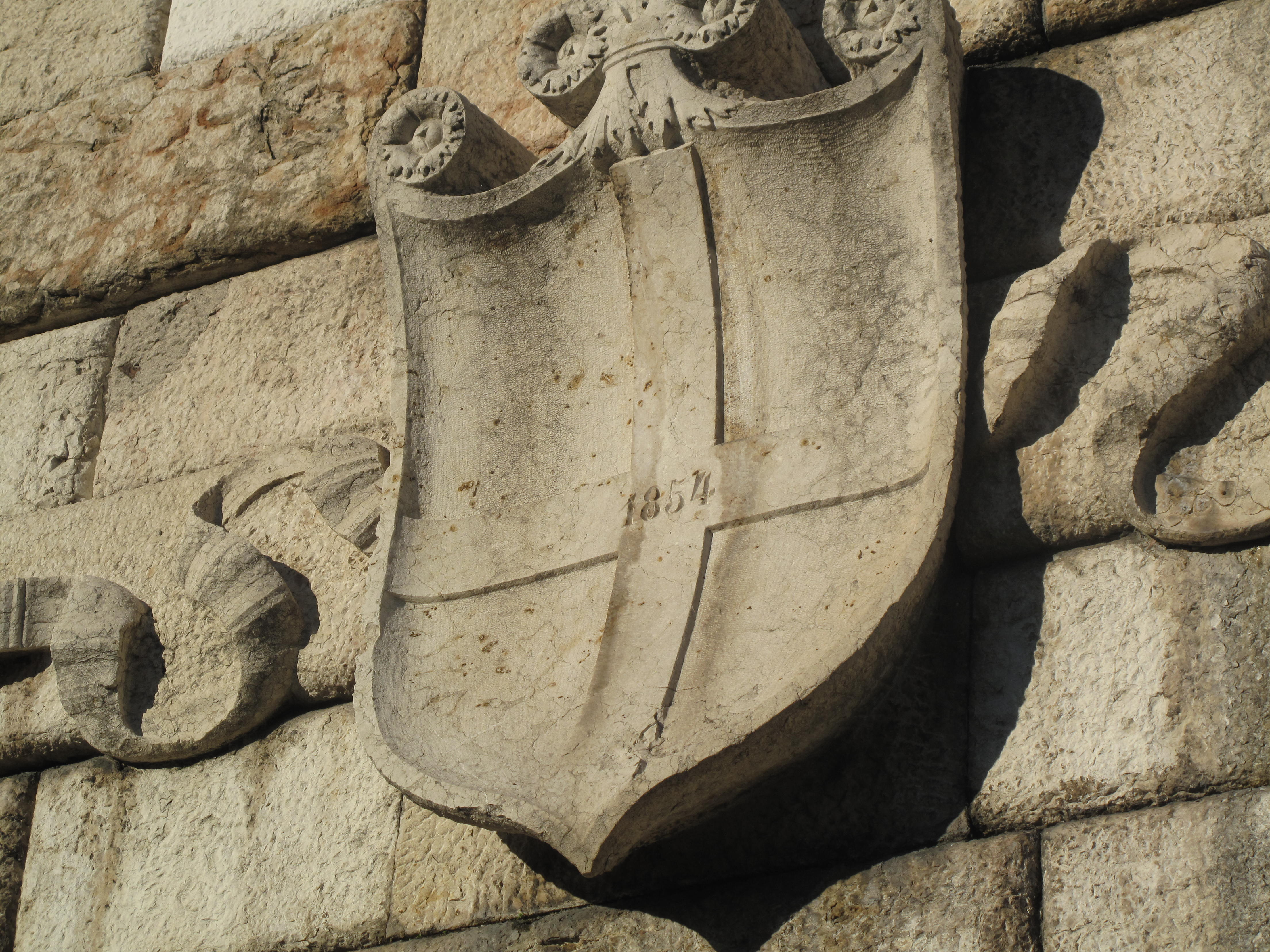 Dettaglio di uno stemma (con scritto l'anno delle aggiunte austriache all'edificio) sulla facciata sud di Porta Nuova a Verona